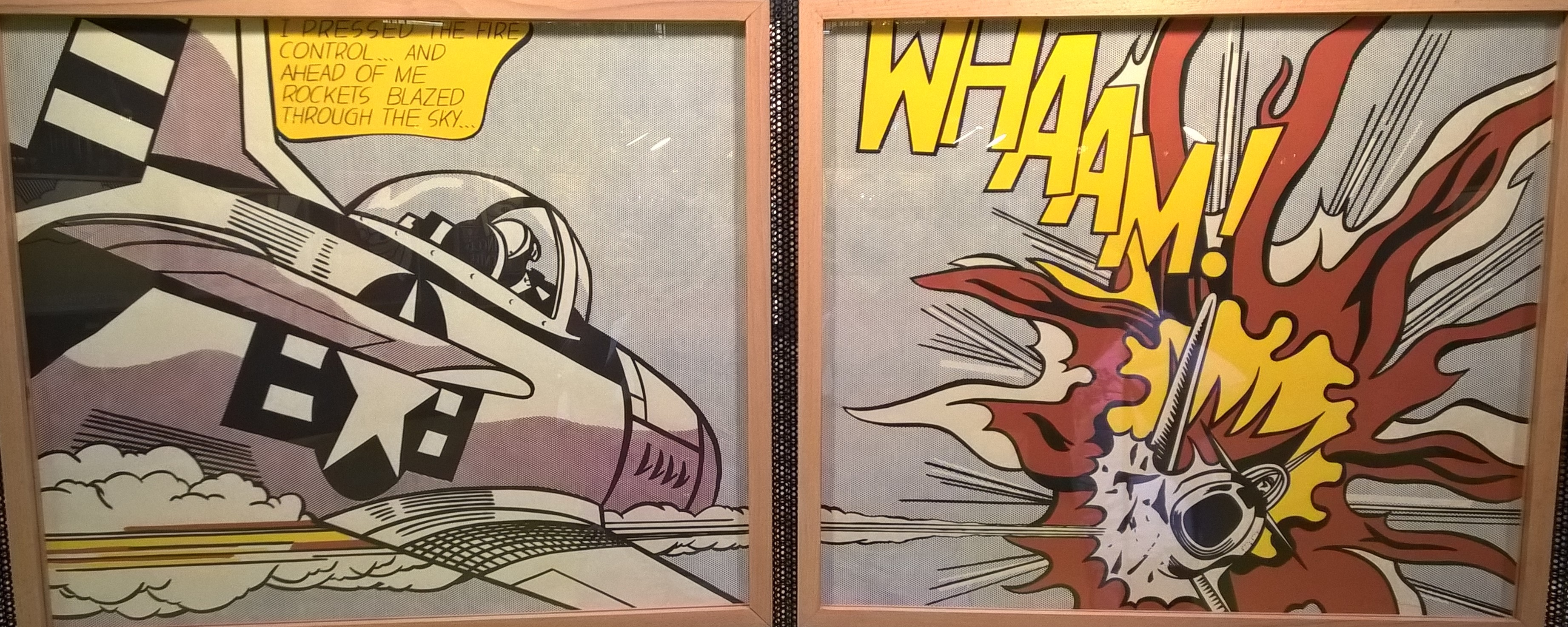 Whaam! - Díptico de Roy Lichtenstein, em exposição no Centro Comercial Colombo de 19 a 23 de Setembro de 2018